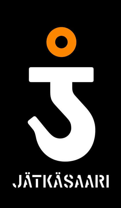 Jätkäsaaren visuaalisen identiteetin on suunnitellut helsinkiläinen suunnittelutoimisto BOTH vuonna 2009.